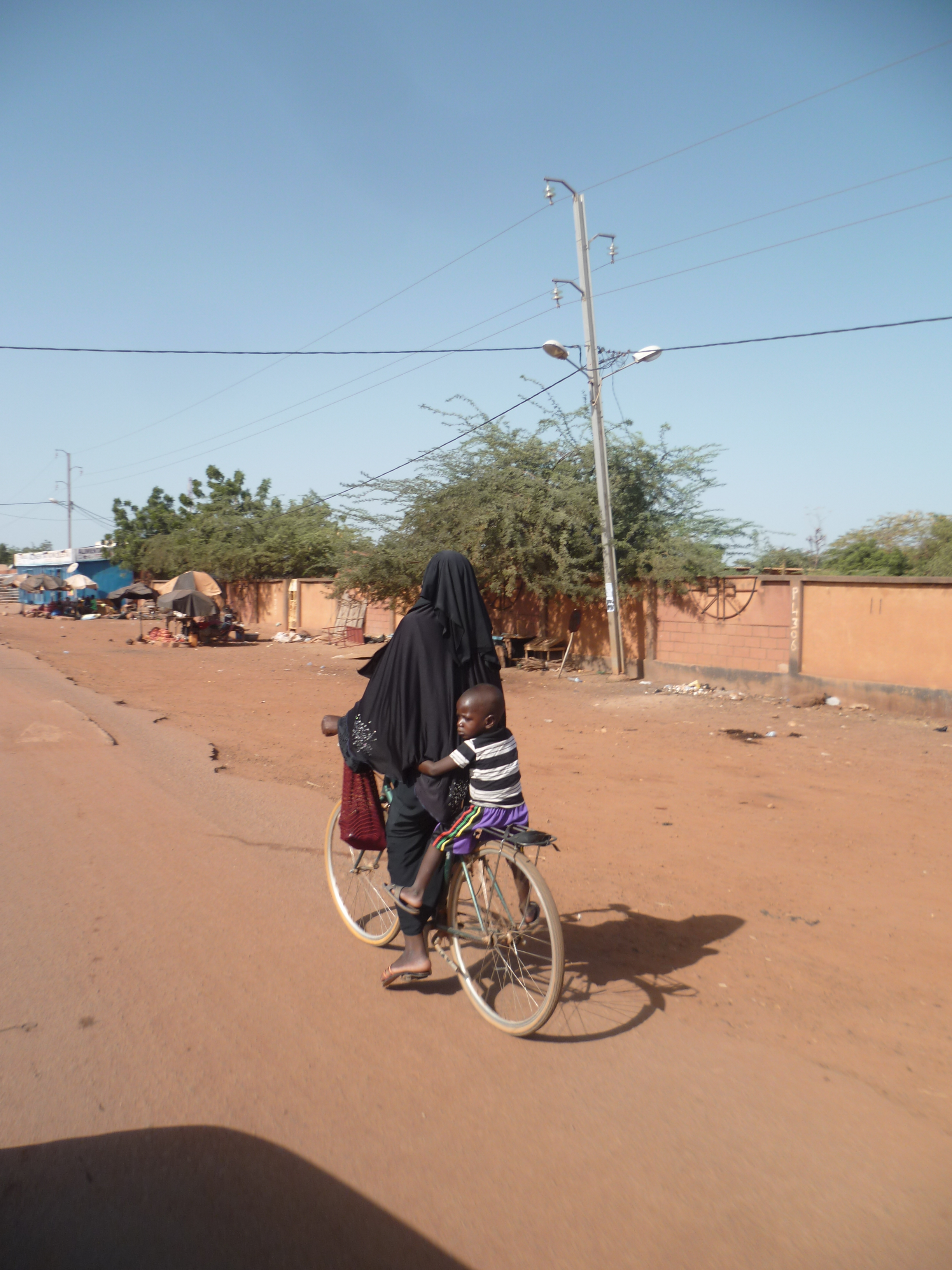 Burkina Faso - Kongoussi - Déplacement à vélo This is an image with the theme "Africa on the Move or Transport" from: Burkina Faso